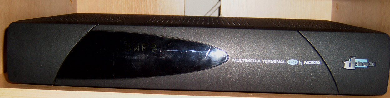 Nokia d-box 1 mit DVB2000